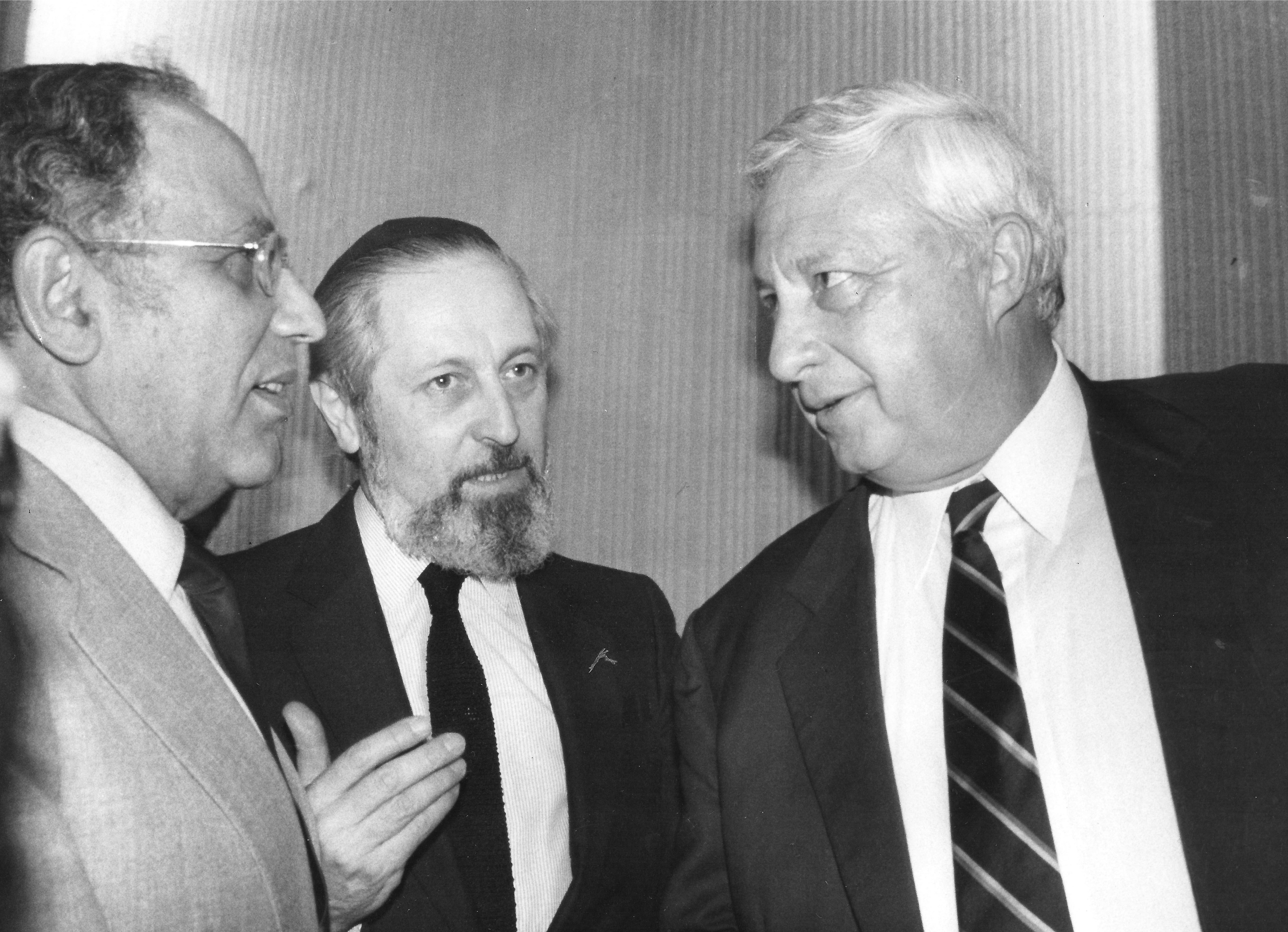 הפגישה עם אריאל שרון התקימה בפאריס ביוני 1983